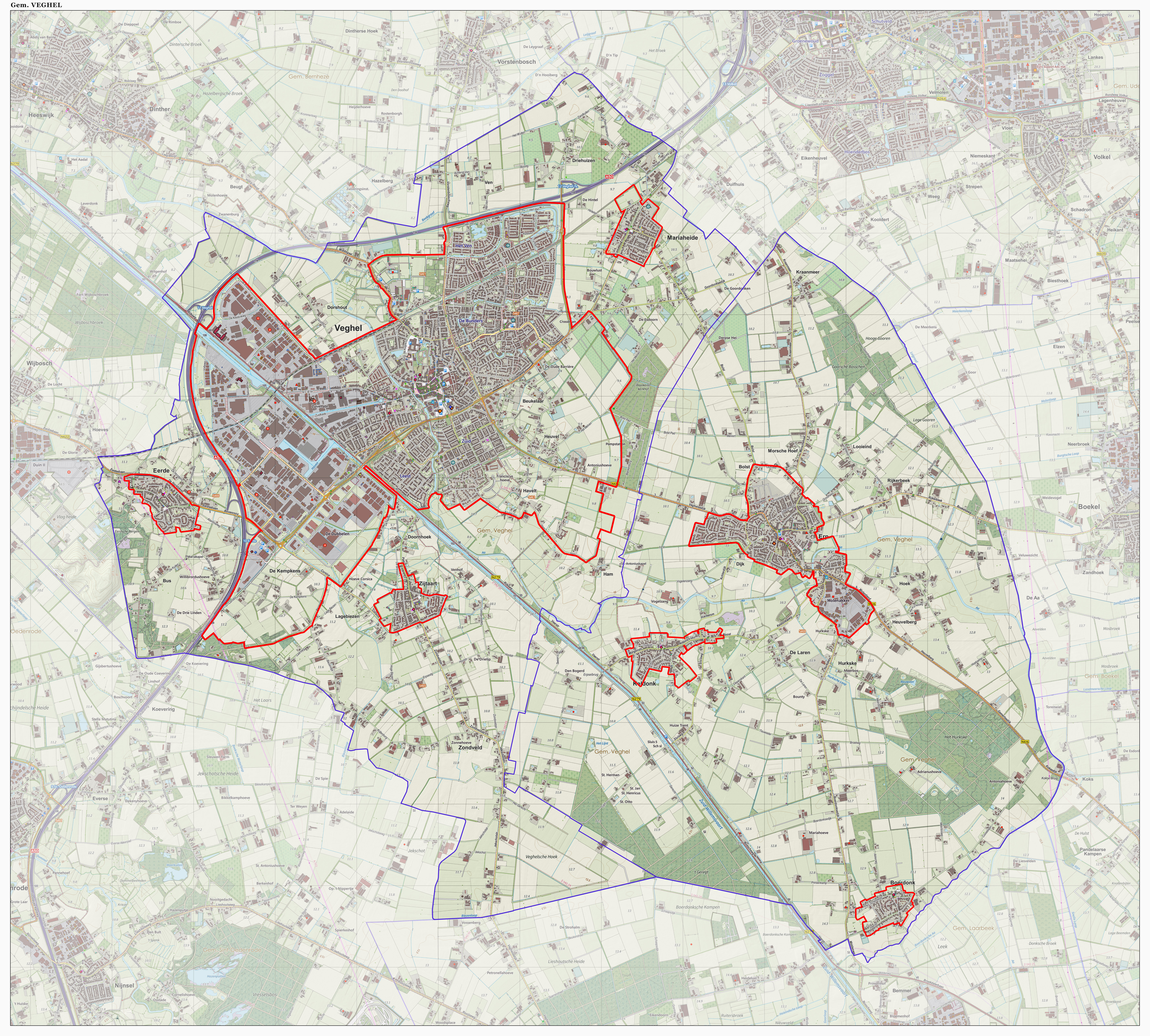 Topografische kaart van gemeente Veghel, met de woonplaatsgrenzen (BAG) en komgrenzen van de 7 bebouwde kommen in de gemeente. Resolutie: 400 pixels/km. Kaartbeeld samengesteld uit de open geodata van de Top10NL en Top25namen (Kadaster), Creative Commons-BY licentie. Gebouwvlakken uit open geodata BAG extract. Wegen uit de OpenStreetMap, OpenStreetMap community. Reliëfschaduw uit de Actuele Hoogtekaart AHN2. Samenstelling en kleurenschema: Jan-Willem van Aalst, met QGIS. Zie ook de Legenda.